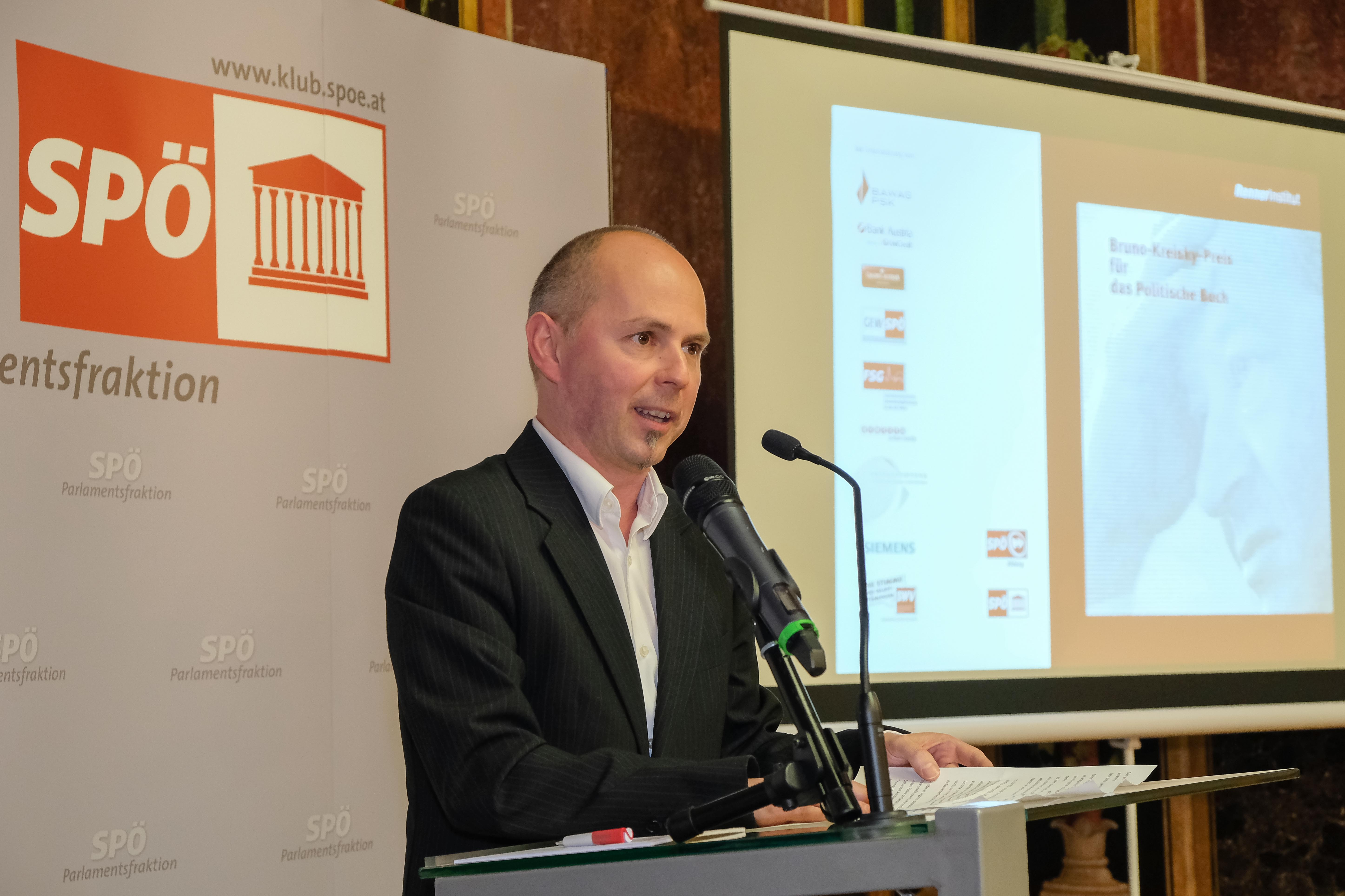 Foto: Walter Henisch Verleihung des Bruno-Kreisky-Preis für das Politische Buch 2015